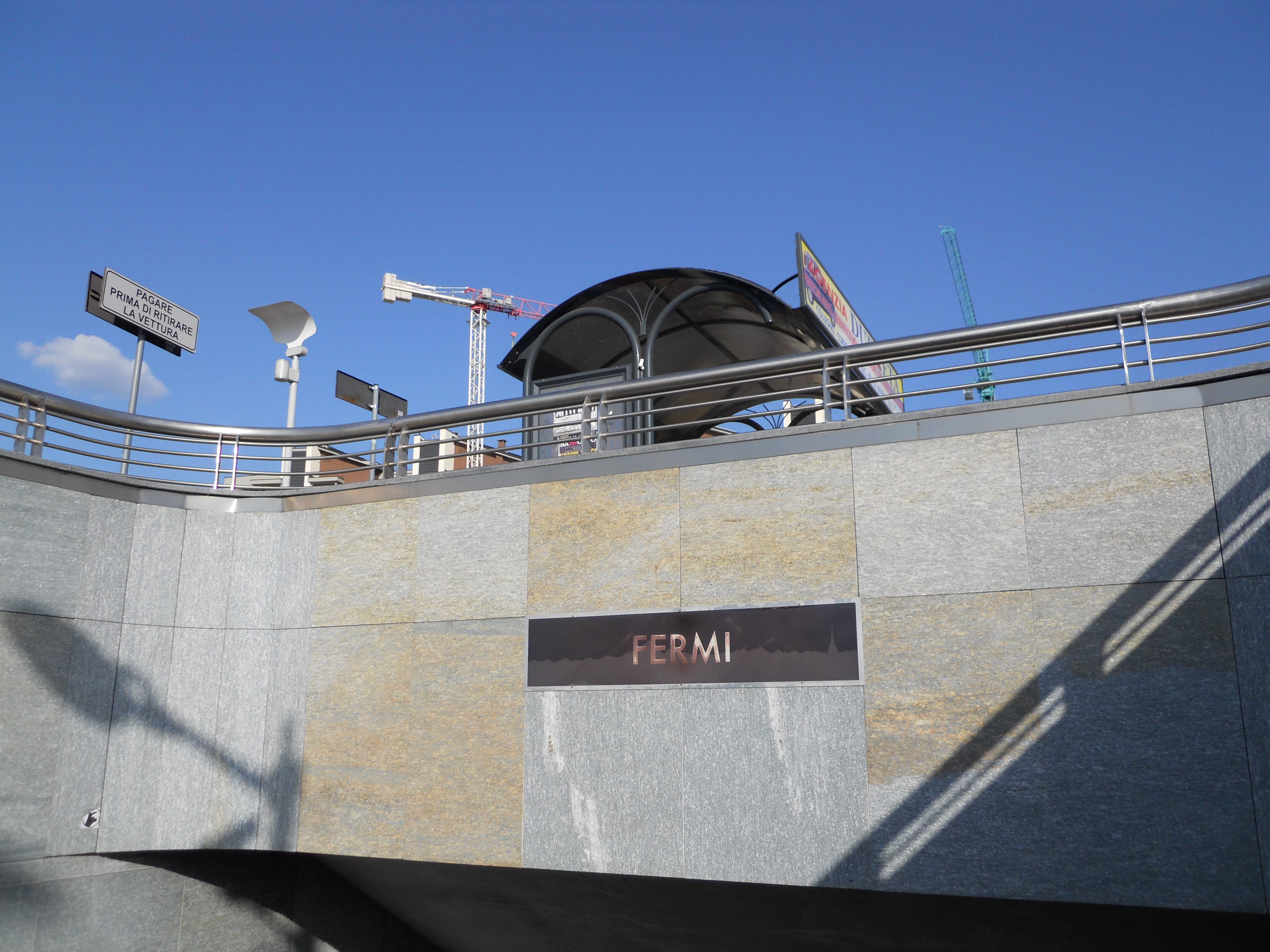 Ingresso Stazione Fermi